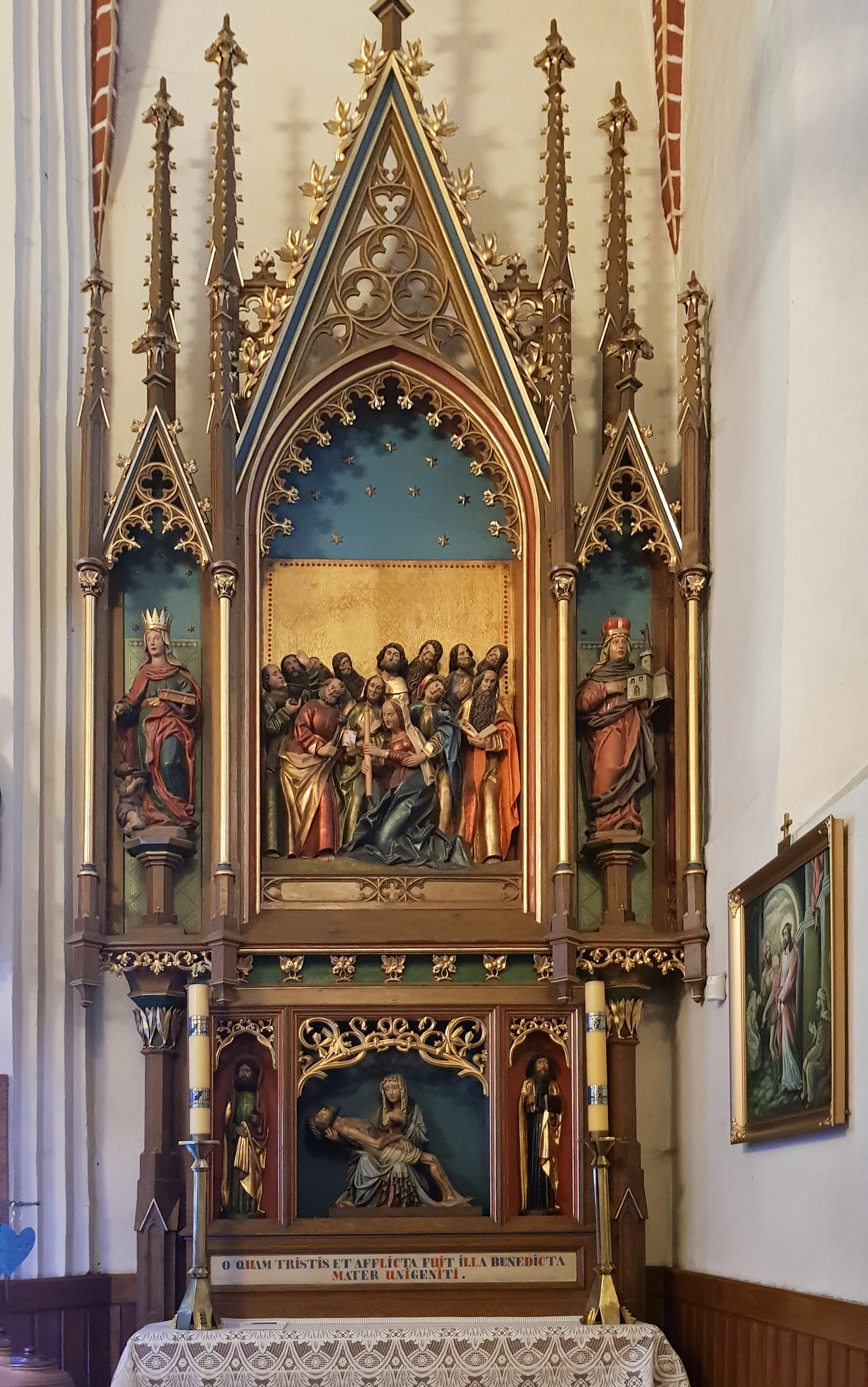 Kościół Wniebowzięcia Najświętszej Maryi Panny we Wrocławiu-Ołtaszynie, ołtarz południowy z płaskorzeźbą Zaśnięcia NMP (część centralna) i Pietà.